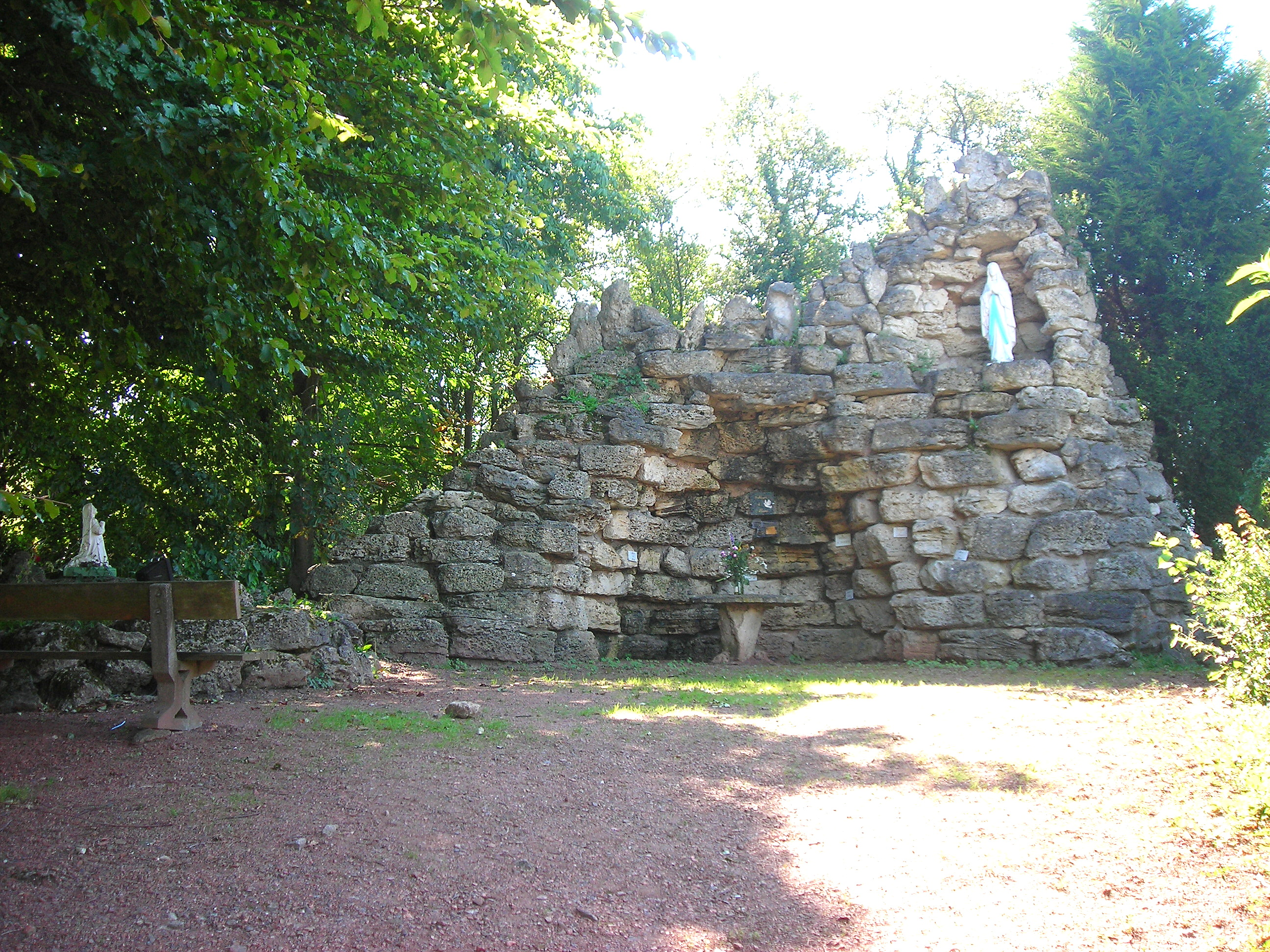 Grotte de Lourdes à Obervisse (Moselle, France).